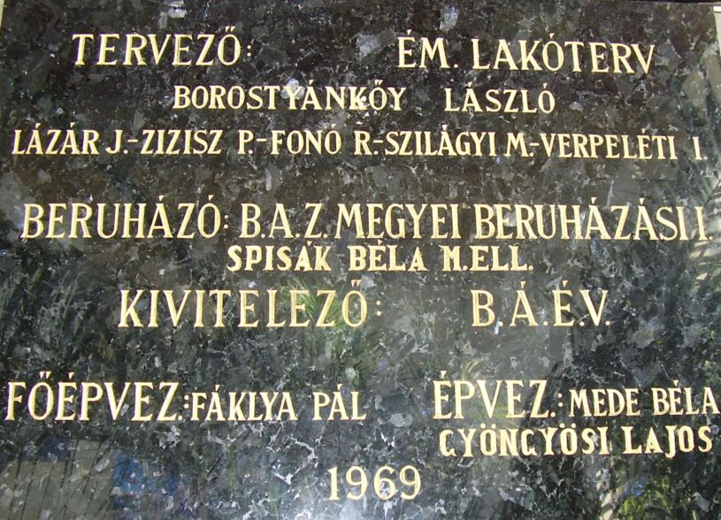 Az Egressy Béni Művelődési Központ előterében látható emléktábla (Kazincbarcika, Fő tér 5.)